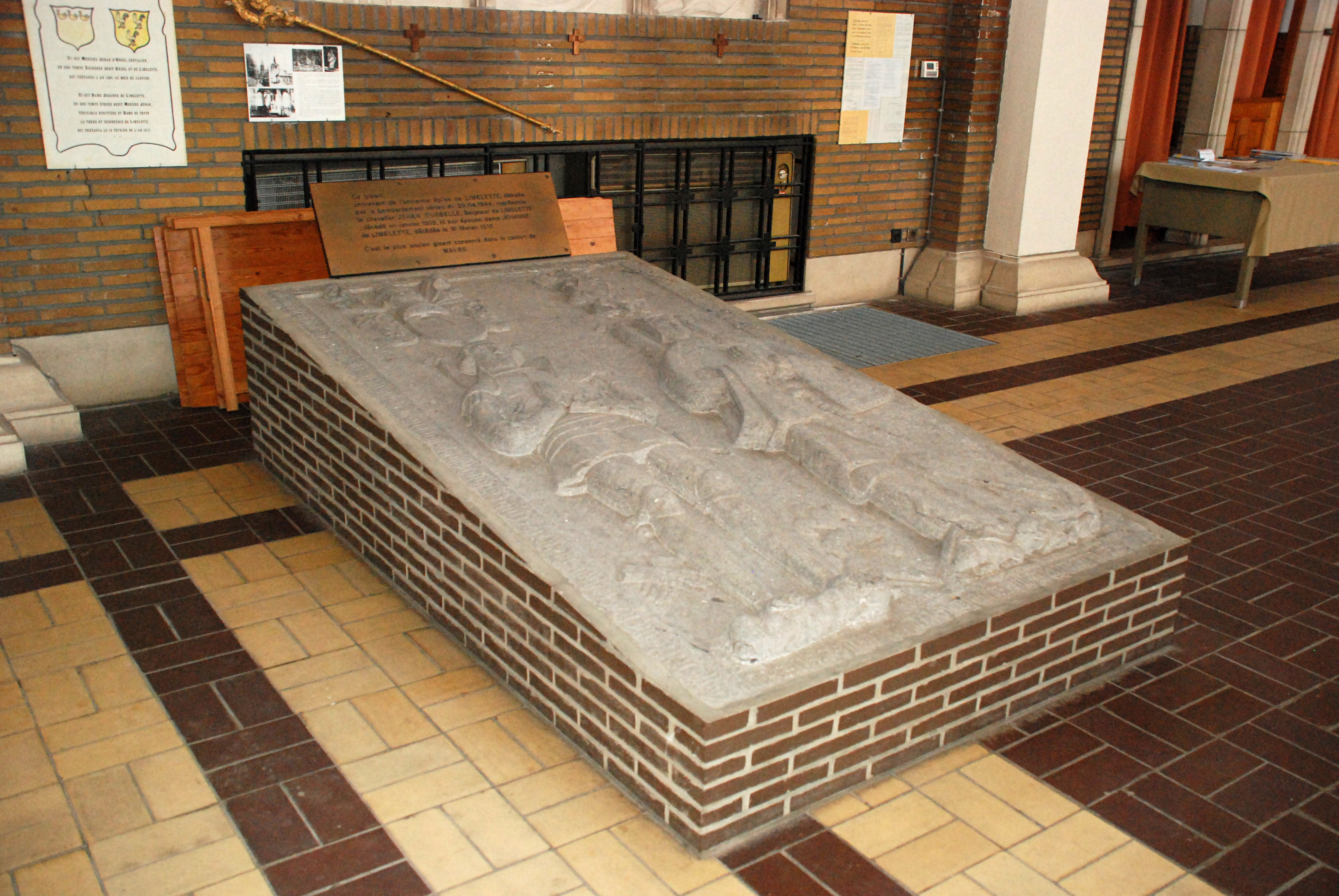 Belgique - Brabant wallon - Ottignies - Limelette - Église Saint-Géry - Gisant de Jeanne de Limelette et du chevalier Jean d'Ursel